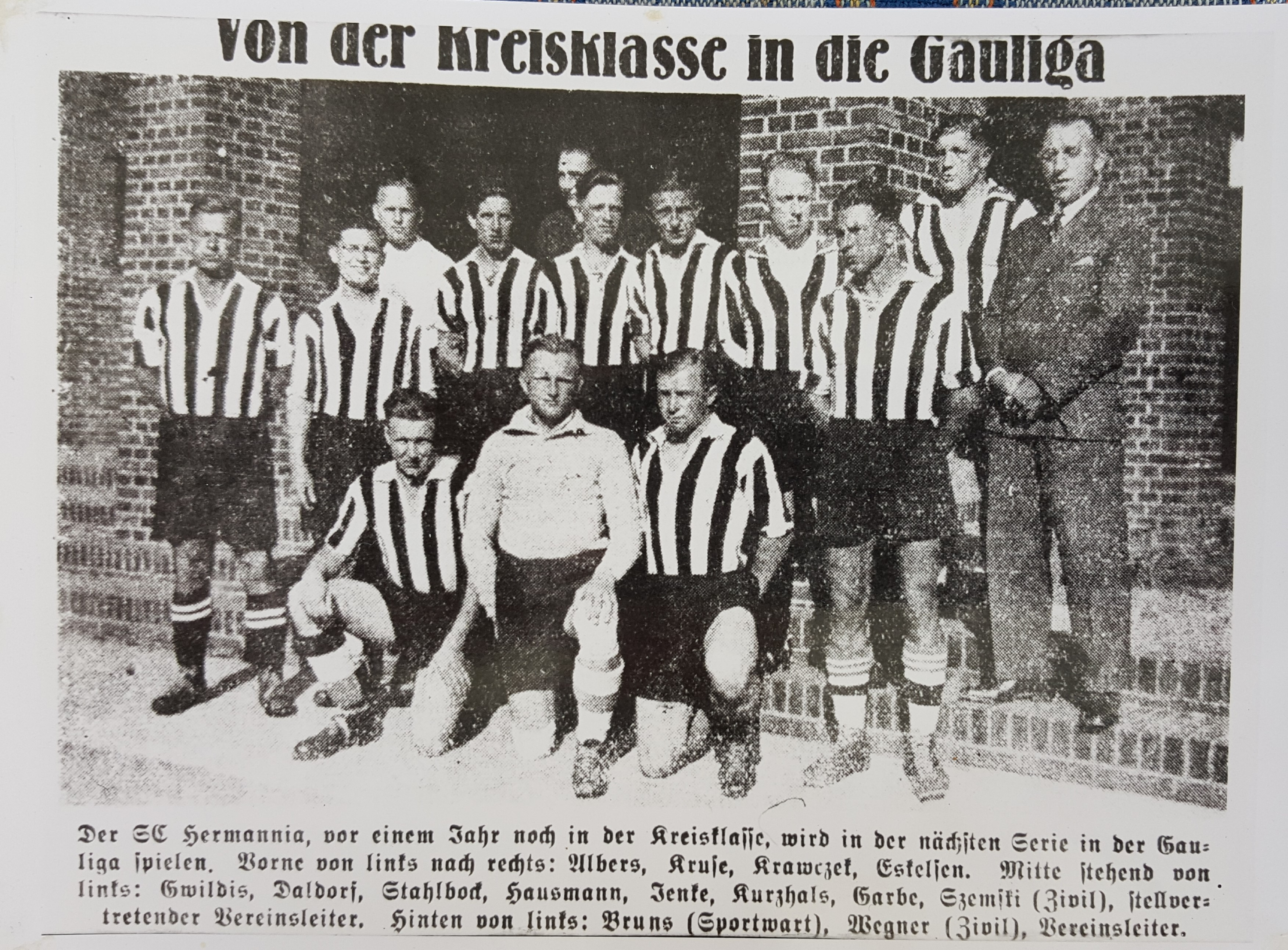 Unbekanntes Aufnahmedatum, der Ort der Aufnahme koennte die Schule auf der Veddel gewesen sein!